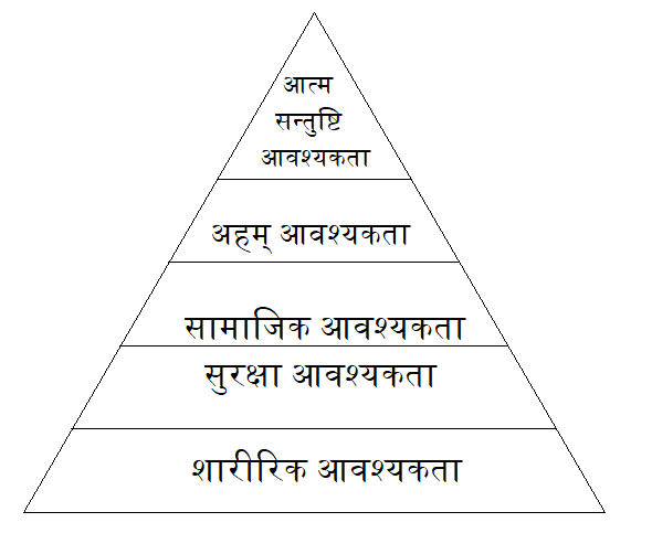 नेपाली: आवश्यकता शृंखला सिद्धान्त